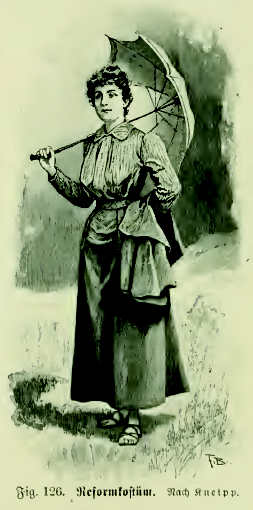 Fig. 126. Reformkostüm. Nach Kneipp.